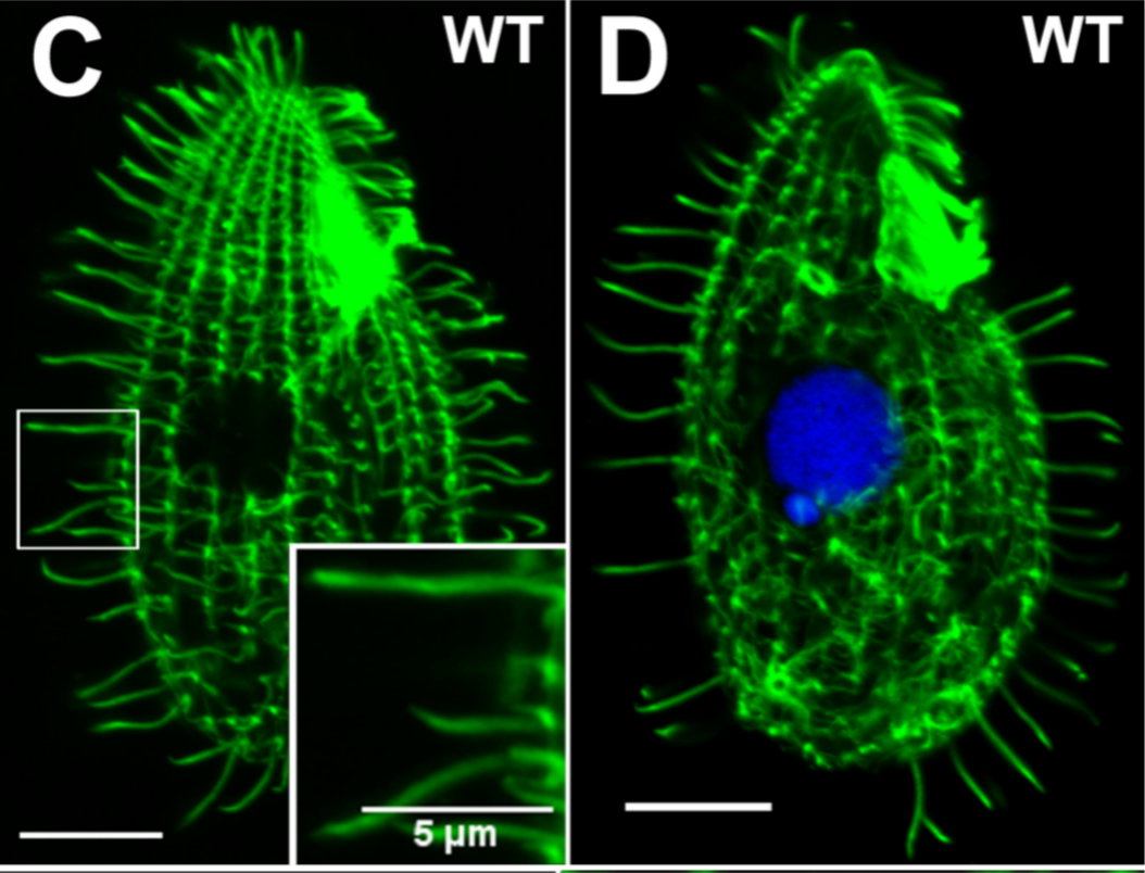 Figura 1. Se requieren subunidades CCT para el ensamblaje de microtúbulos axonemales, corticales y del cuerpo celular de Tetrahymena thermophila. Inmunofluorescencia confocal de α-tubulina en el tipo salvaje de Tetrahymena thermophila, CCTα-KO, CCTδ-KO y tubulina-KO. C–D Células de tipo salvaje. En C el recuadro muestra una mayor ampliación de un grupo de cilios del área encuadrada. En D doble tinción para macronúcleo (MAC) y micronúcleo (MIC) en azul. Microscopía confocal. Barra de estado 10Template:Esdµm.